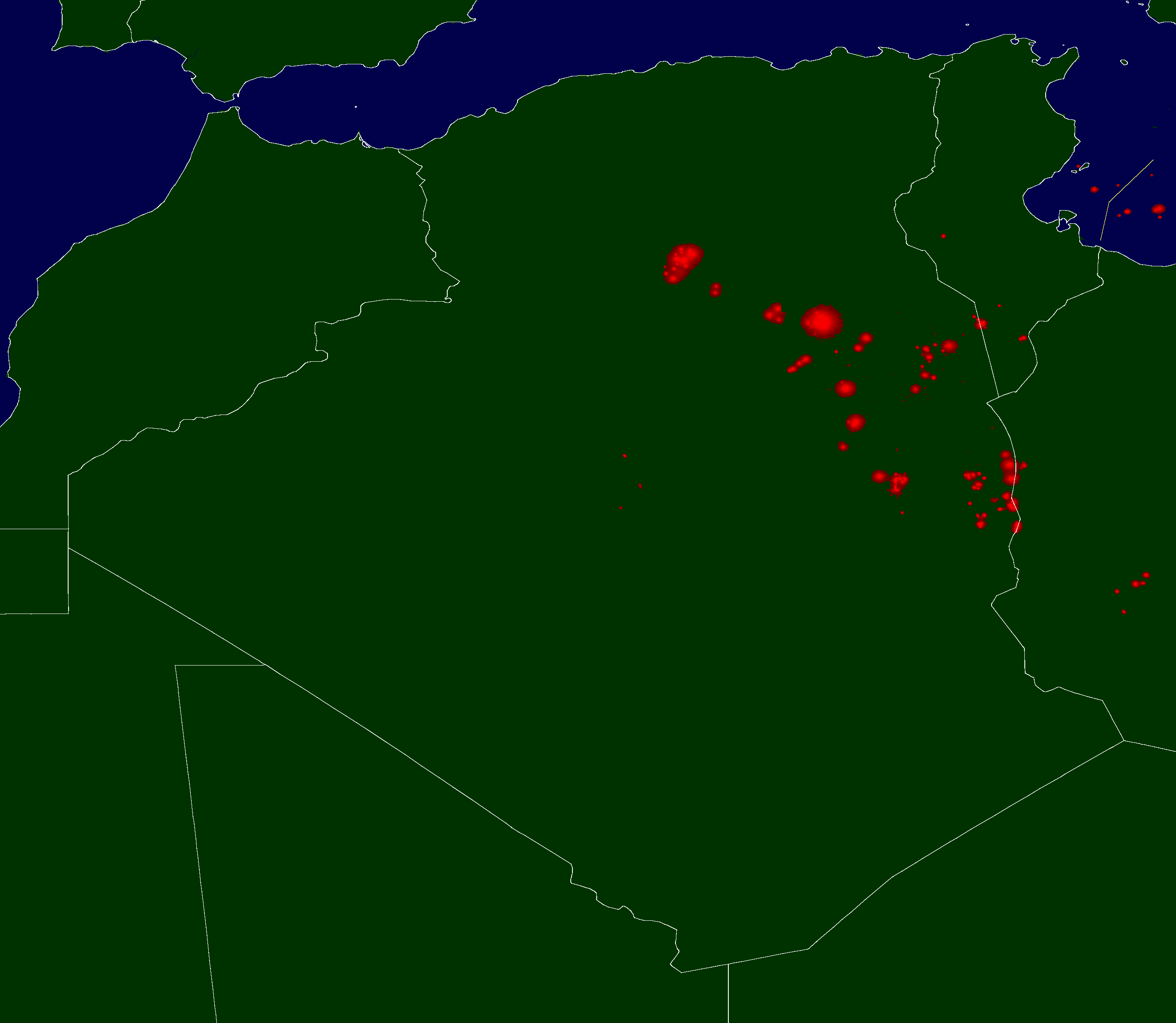 Algeria gas flares